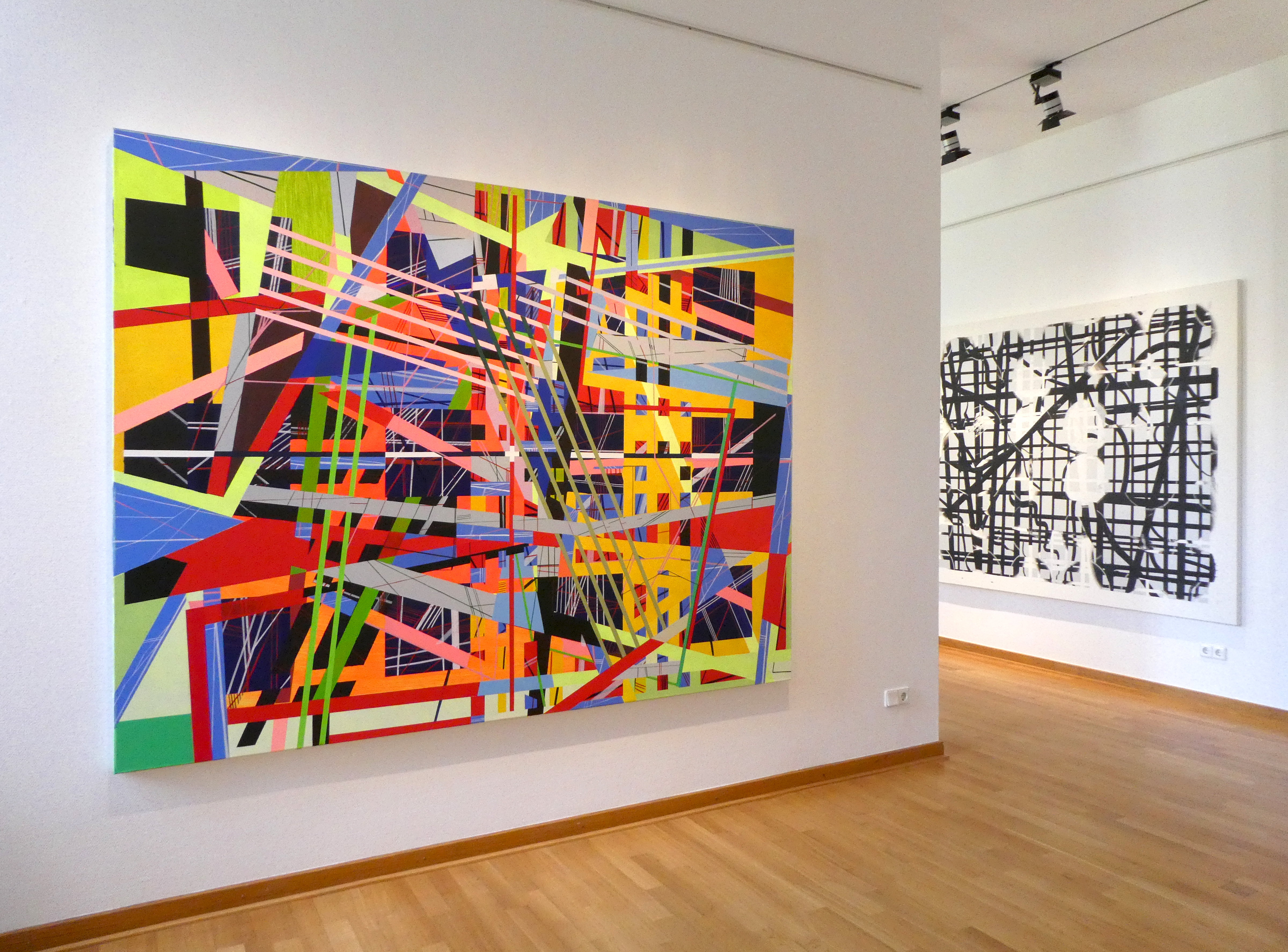 Die beiden 2017 während der Ausstellung abgeklebt in der Städtischen Galerie Eichenmüllerhaus in Lemgo gezeigten Gemälde des Malers Bernhard Kock beziehen sich schon in der Namensgebung auf von dem Künstler bereiste Orte in Japan: „Tobishima-Pier und Kyoto'“ ...